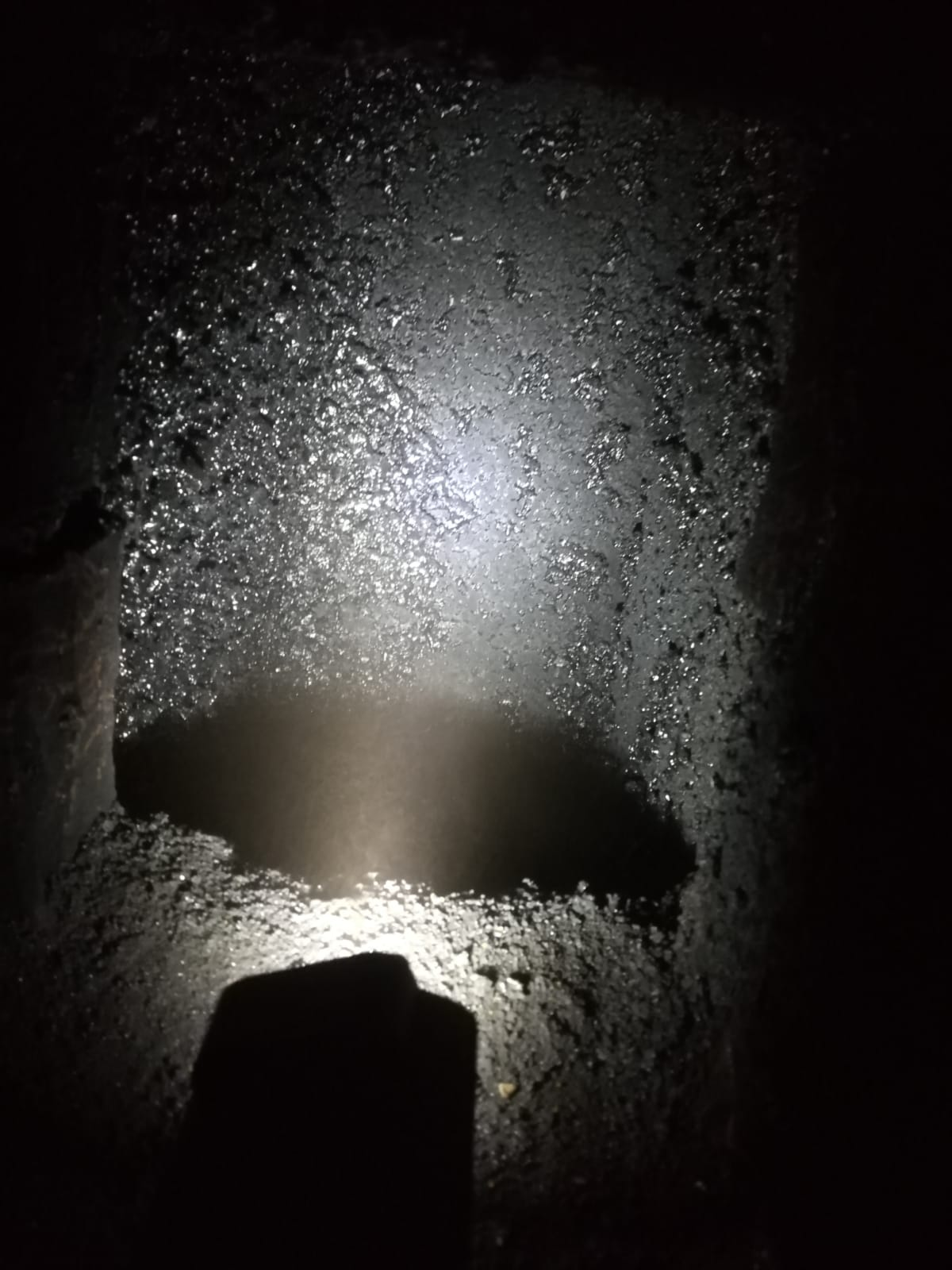 zeigt Glanzruß in einem Kamin (sicht durch die Revisionsöffnung)